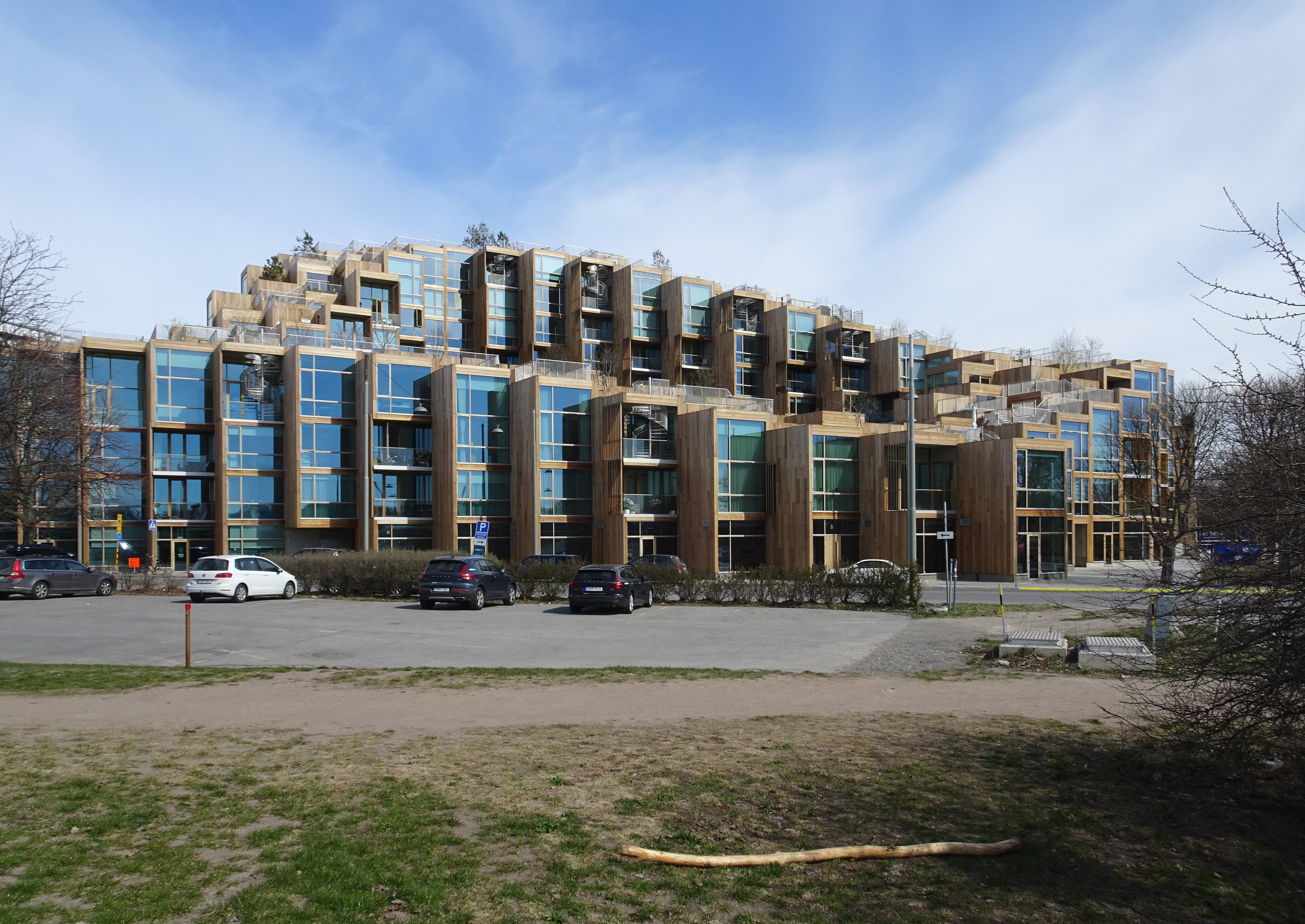 Fastigheten Stettin 7, Sandhamnsgatan 79. Byggherre: Oscar Properties Arkitekt: BIG - Bjarke Ingels Group